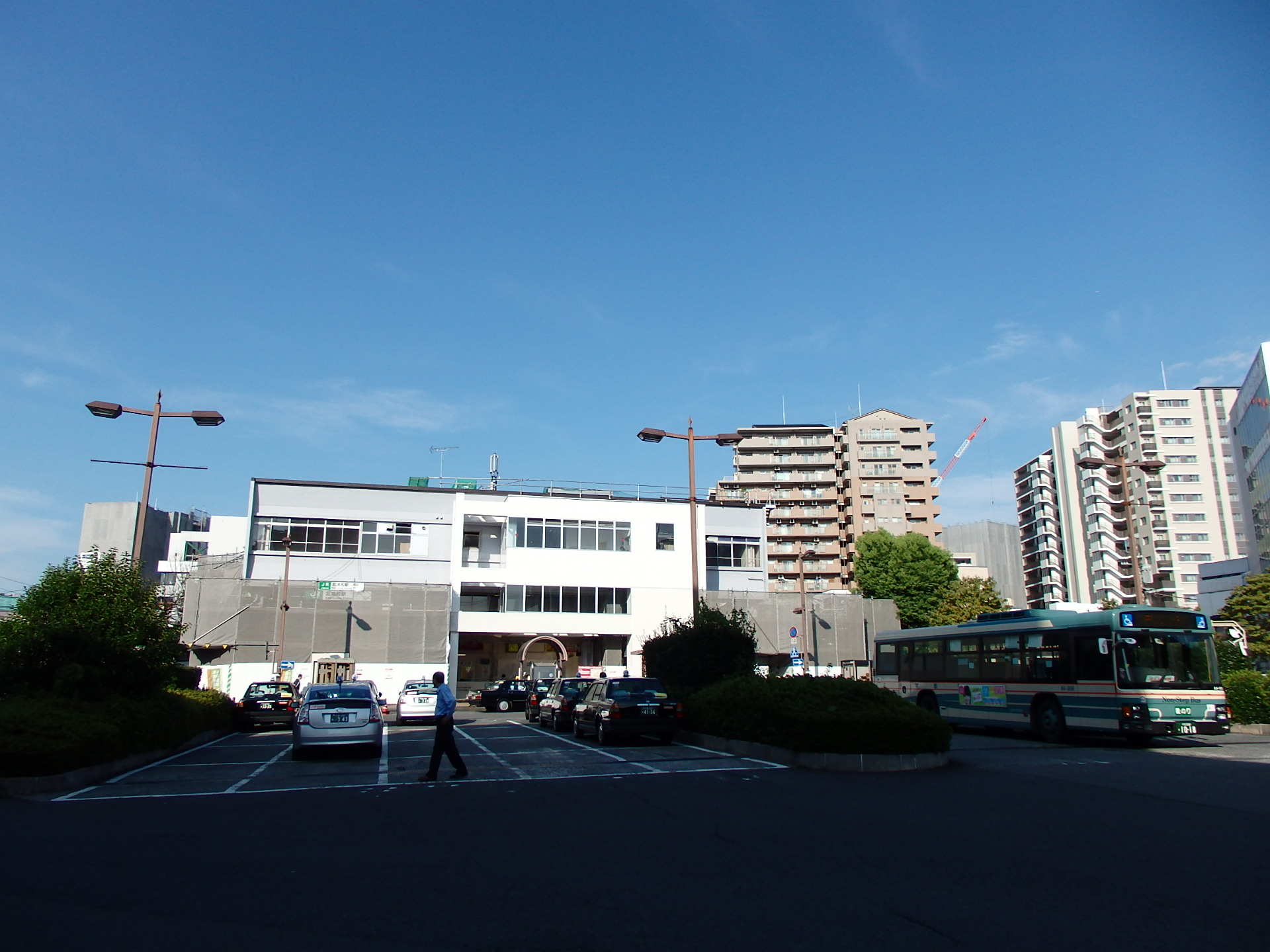 北浦和駅西口